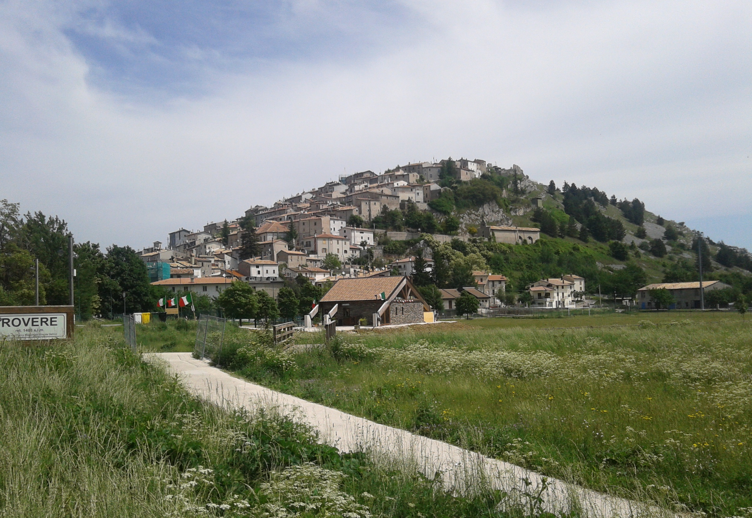 La frazione di Rovere